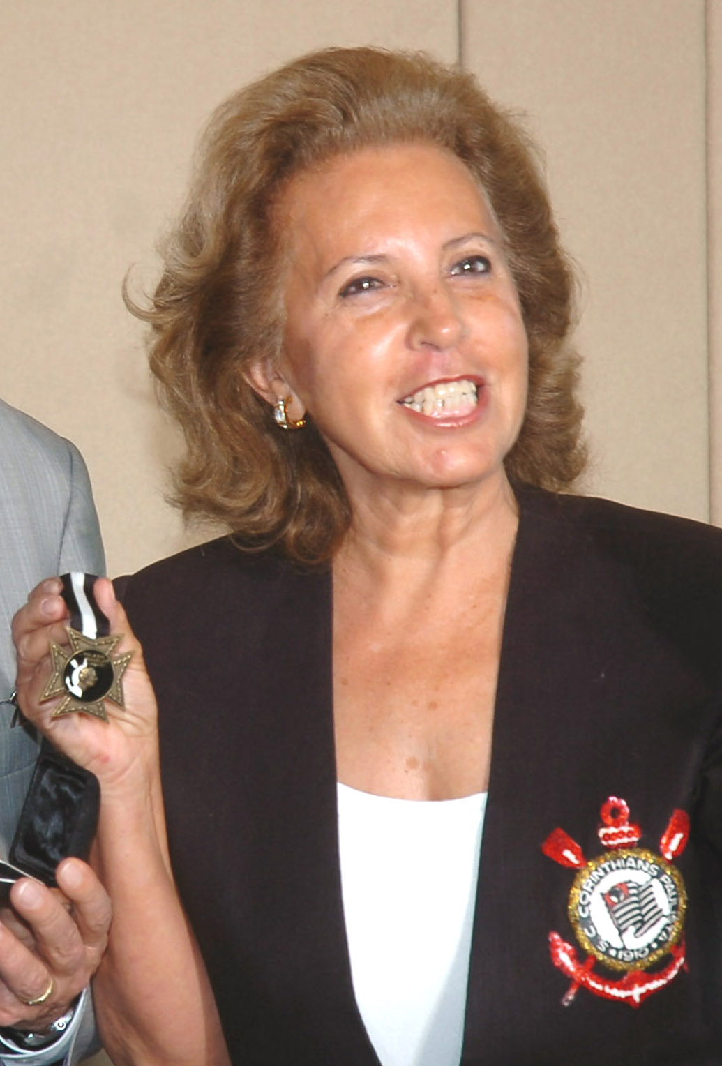 A ex-presidente do Corinthian Marlene Mateus.